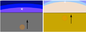 Autor: Francisco Javier Blanco González País: España -Kingom of Spain- Imagen: diagrama de un orto helíaco Junio de 2006